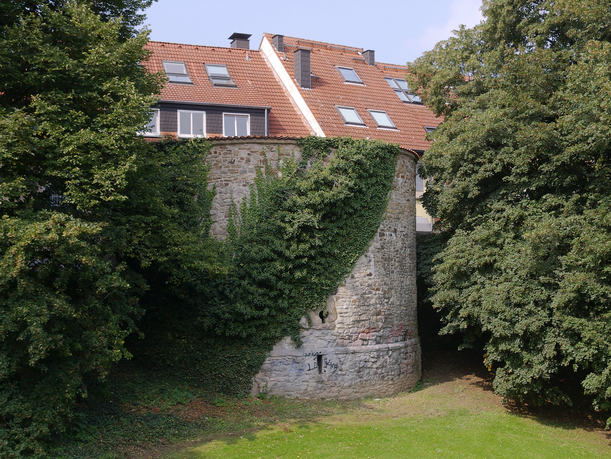 Unna, Eulenturm (Oelkenturm), ein Rest der mittelalterlichen Stadtbefestigung südlich der Stadtmitte